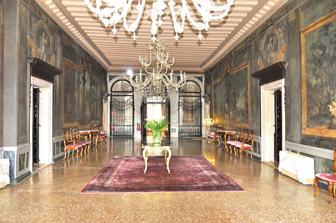 Sala der venezianischen Ca' Sagredo